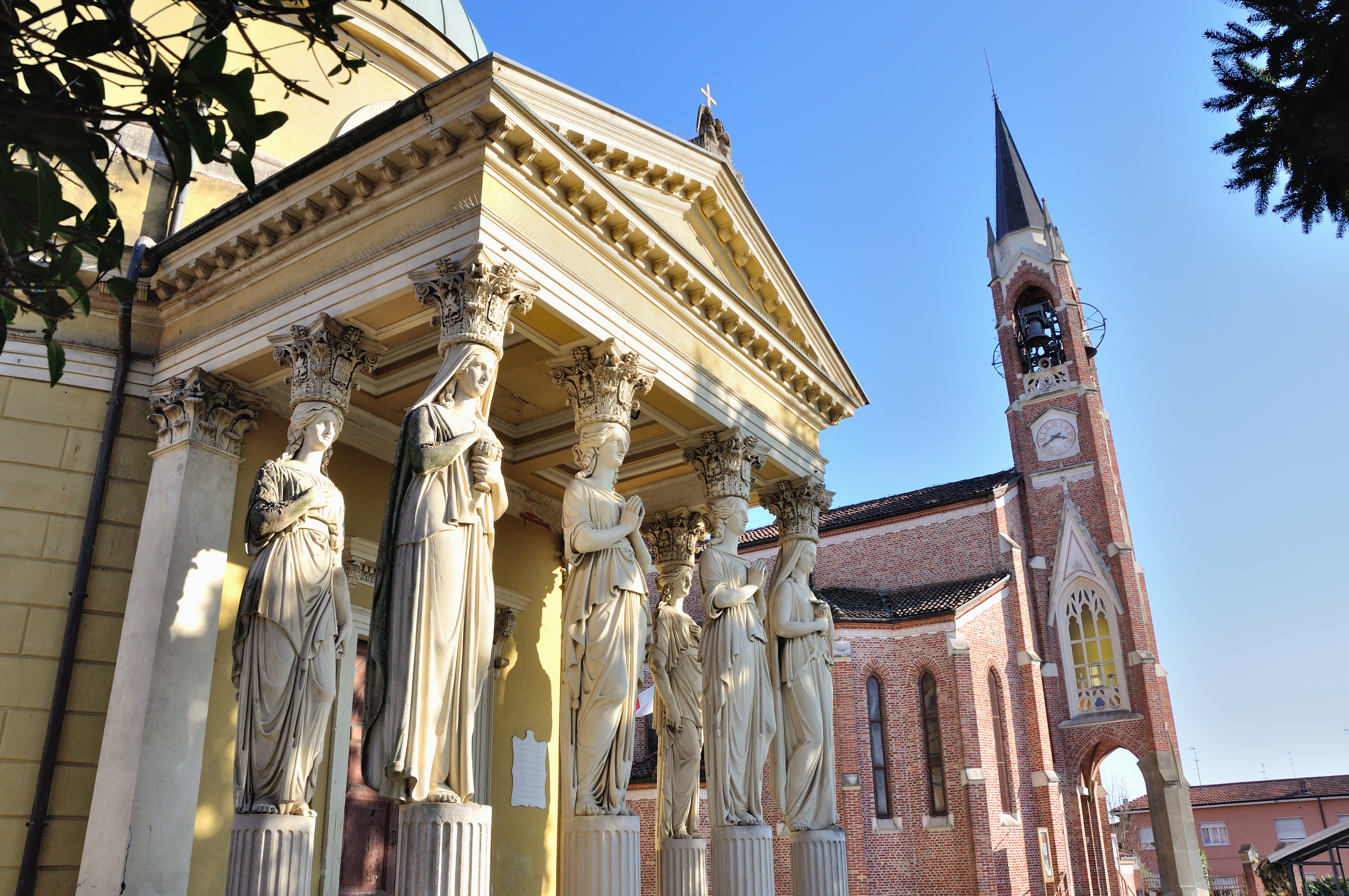 L'immagine, scattata a Tregasio, rappresenta in primo piano le cariatidi che sorreggono il pronao della Rotonda, mentre in secondo piano vi è la chiesa della parrocchia. Entrambi gli edifici sono dedicati ai Santi Martiri Gervaso e Protaso.